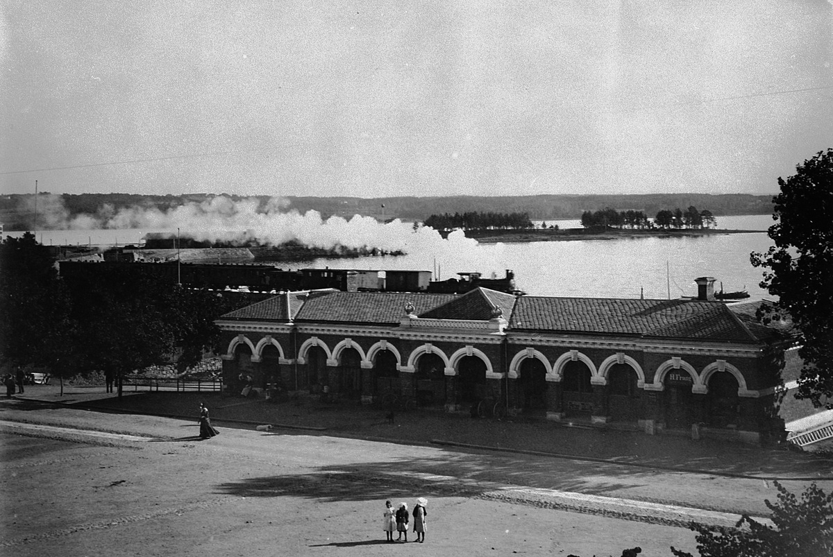 Stortorget Basarbygningen Damptog